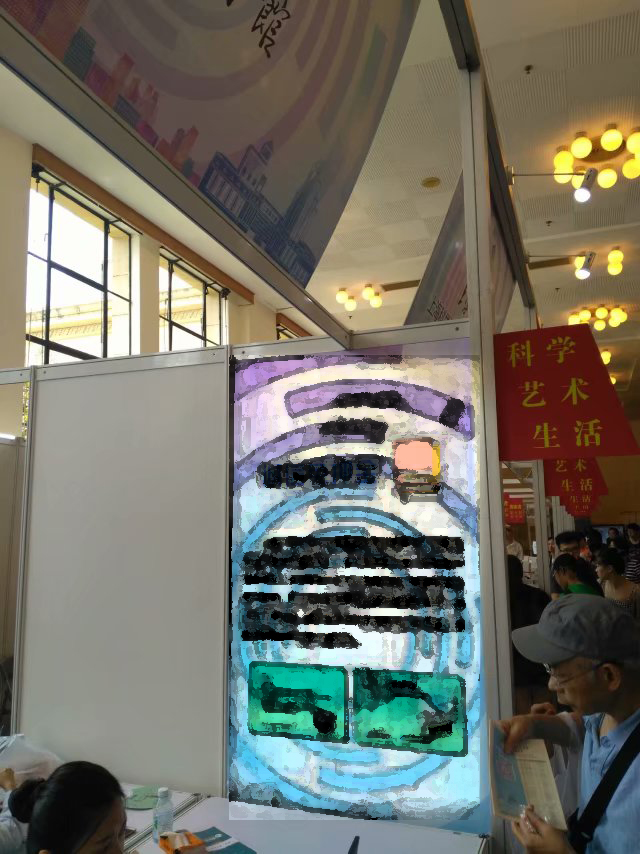 上图在上海书展推广自己的免押金政策（展板已经经过处理）